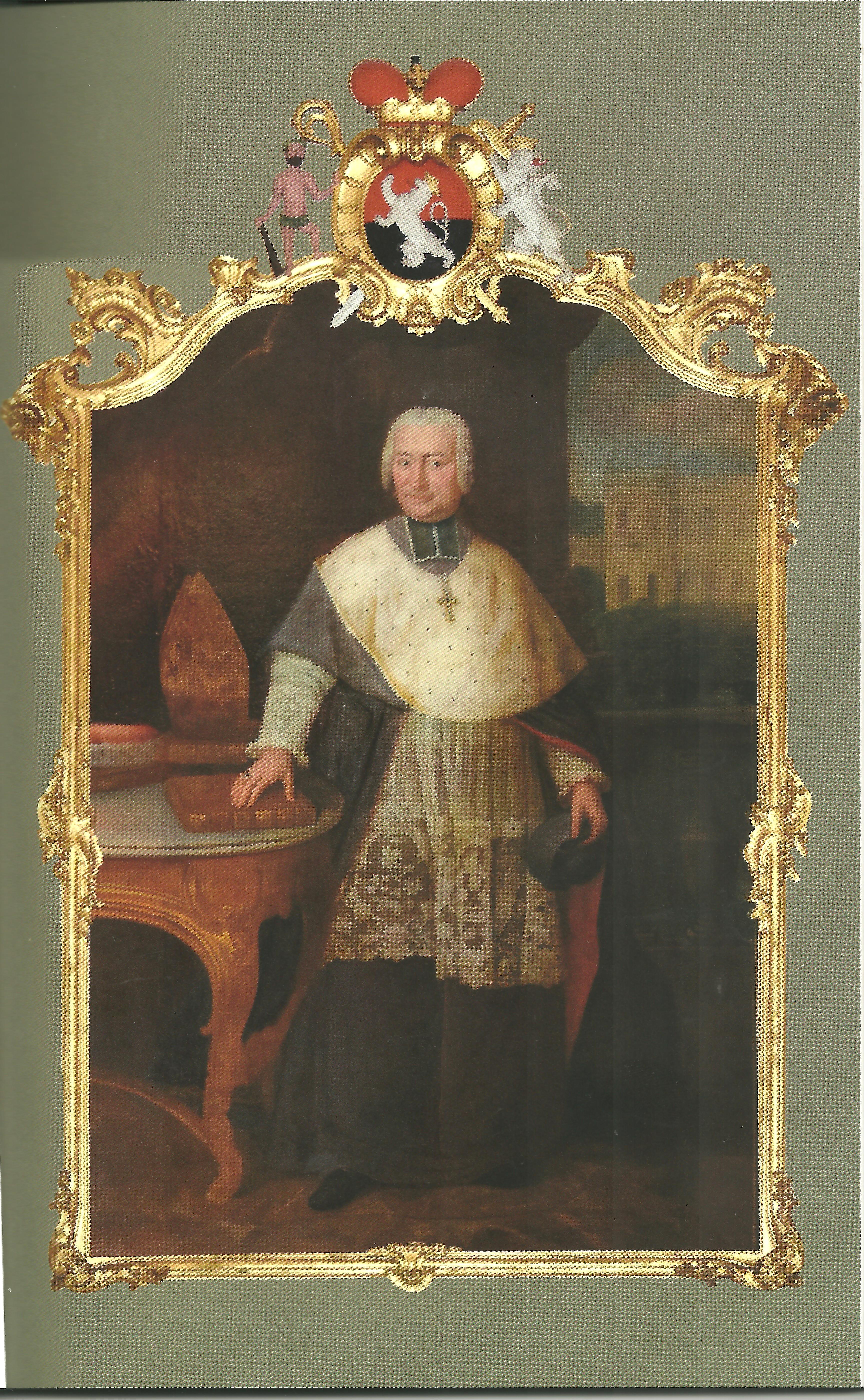 Portrait en pied du Prince-Evèque de Liège Charles-Nicolas d'Oultremont